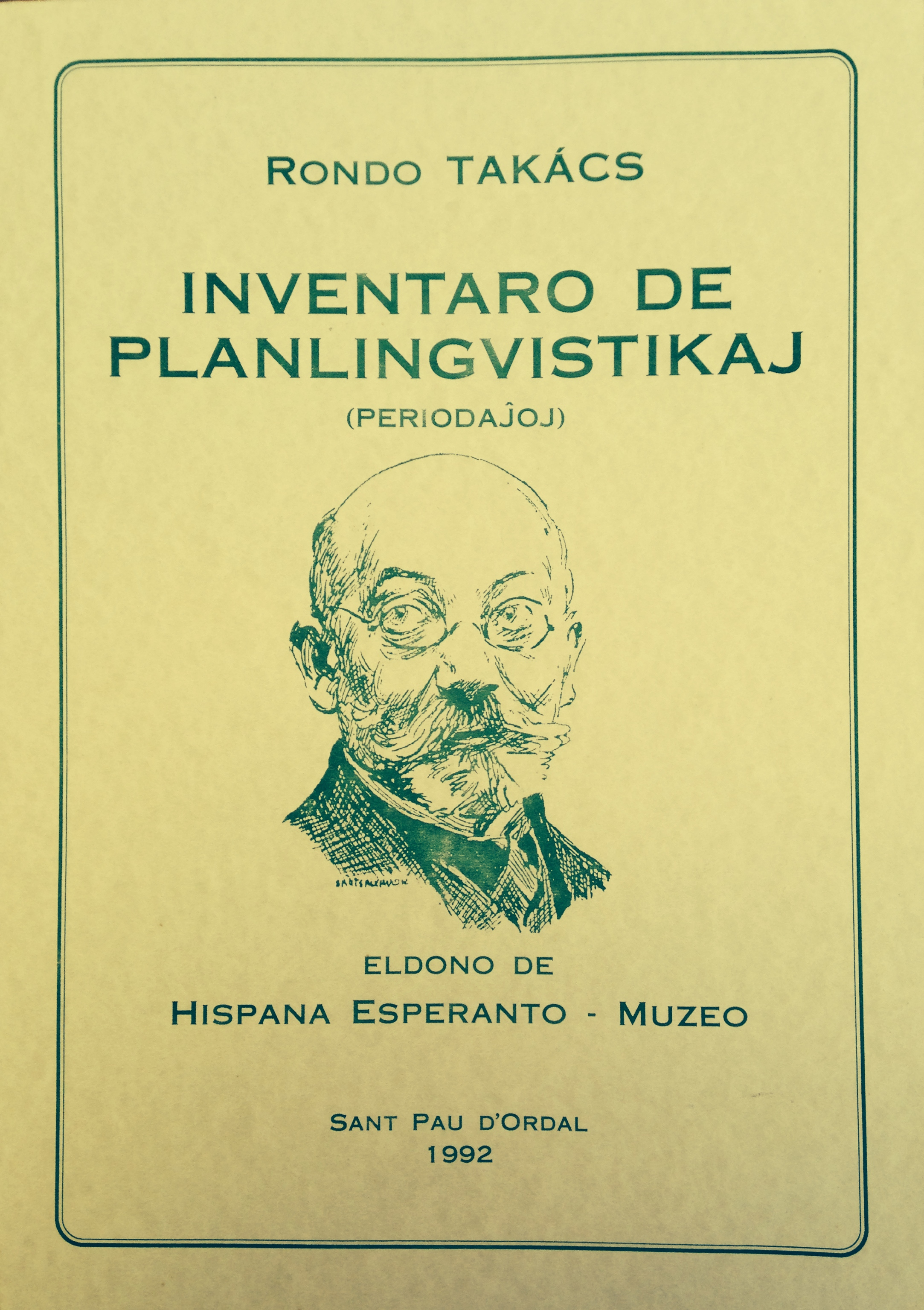 Inventaro de planlingvistikaj (periodaĵoj). Eldono de Hispana Esperanto-Muzeo, Sant Pau d'Ordal, 1992.